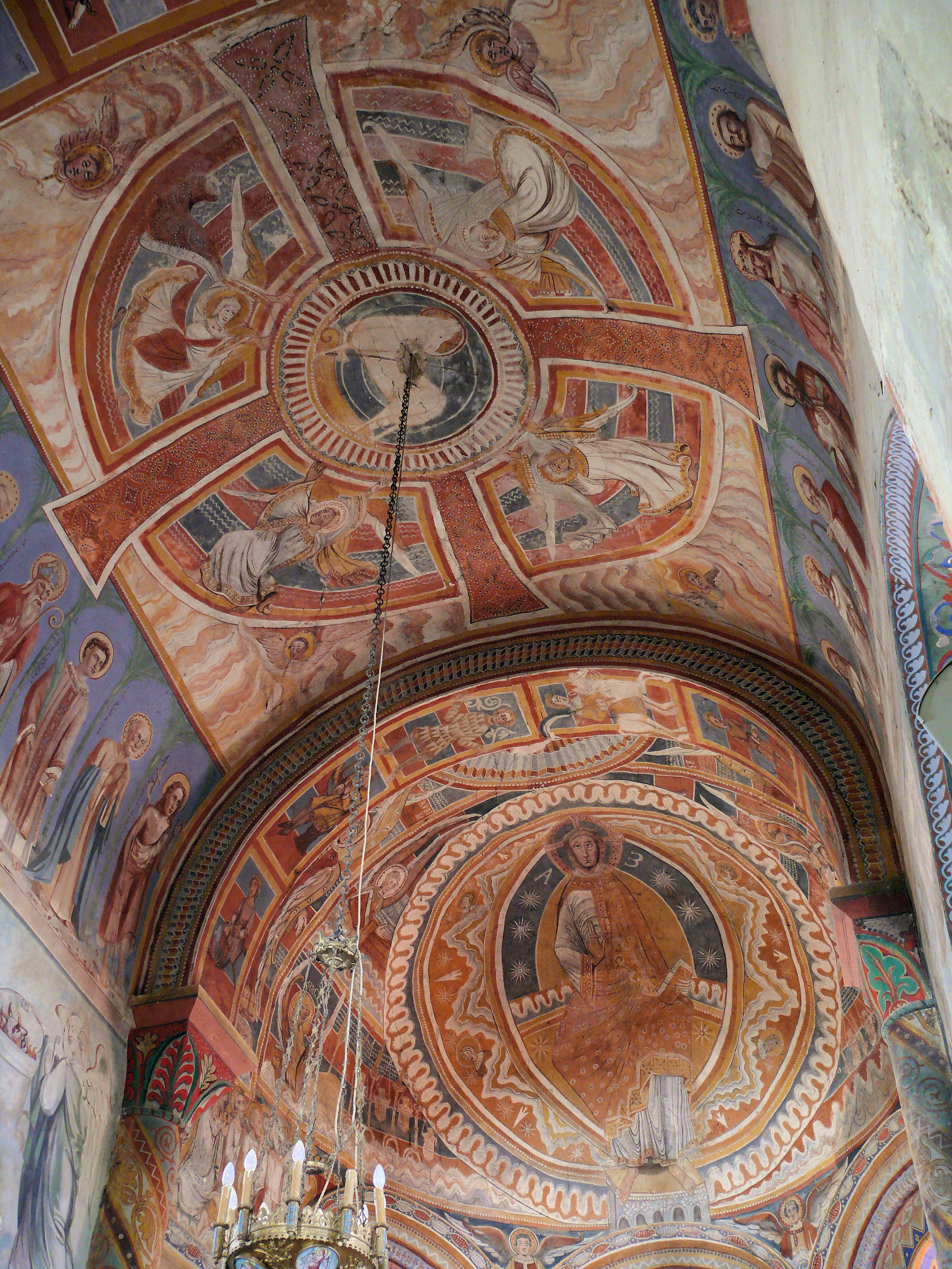 Charly - Église Notre-Dame - Peintures murales du chœur et du cul-de-four de l'abside